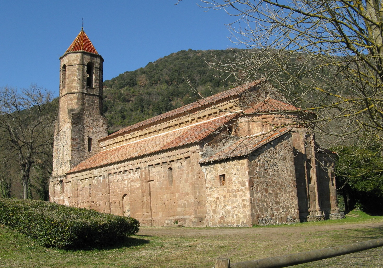 Monastir Romanesque at Sant Joan les Fonts (Catalunya, Spain)